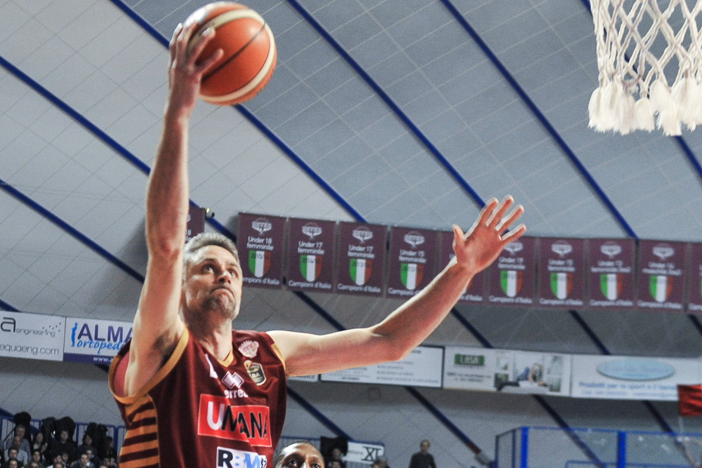 Tomas Ress con la maglia della Reyer Venezia